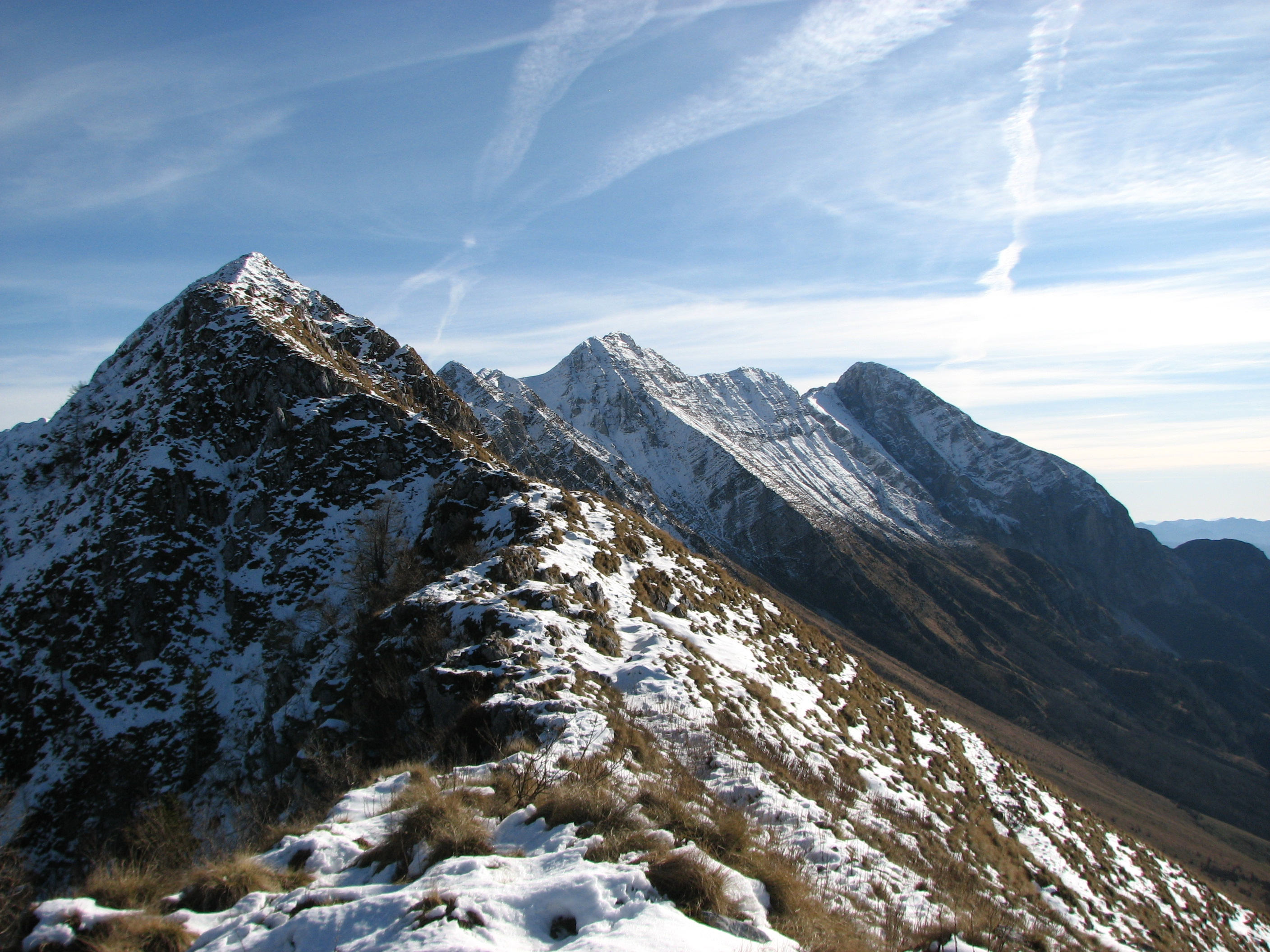 Od vrha Krna se proti severozahodu razteza slikovit in malo obiskan greben, ki se začenja pod steno Krna in konča na Kalu, znan predvsem iz prve svetovne vojne. Na sliki so Vršič (1897 mnm), Vrh Rus (1864 mnm), Oblo Brdo (1957 m), sedlo Vrata (1938 mnm), Krnčica (2142 mnm), Srednji vrh (2134 mnm) in Krn (2244 mnm). Fotografija je bila posneta s Kala 19. novembra 2008.